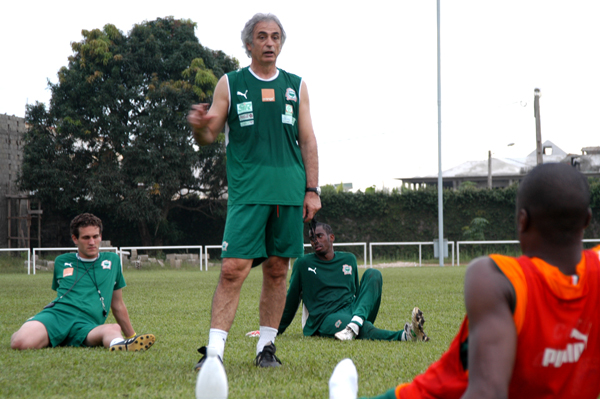 Vahid Halilhodžić, Fußballnationaltrainer der Elfenbeinküste